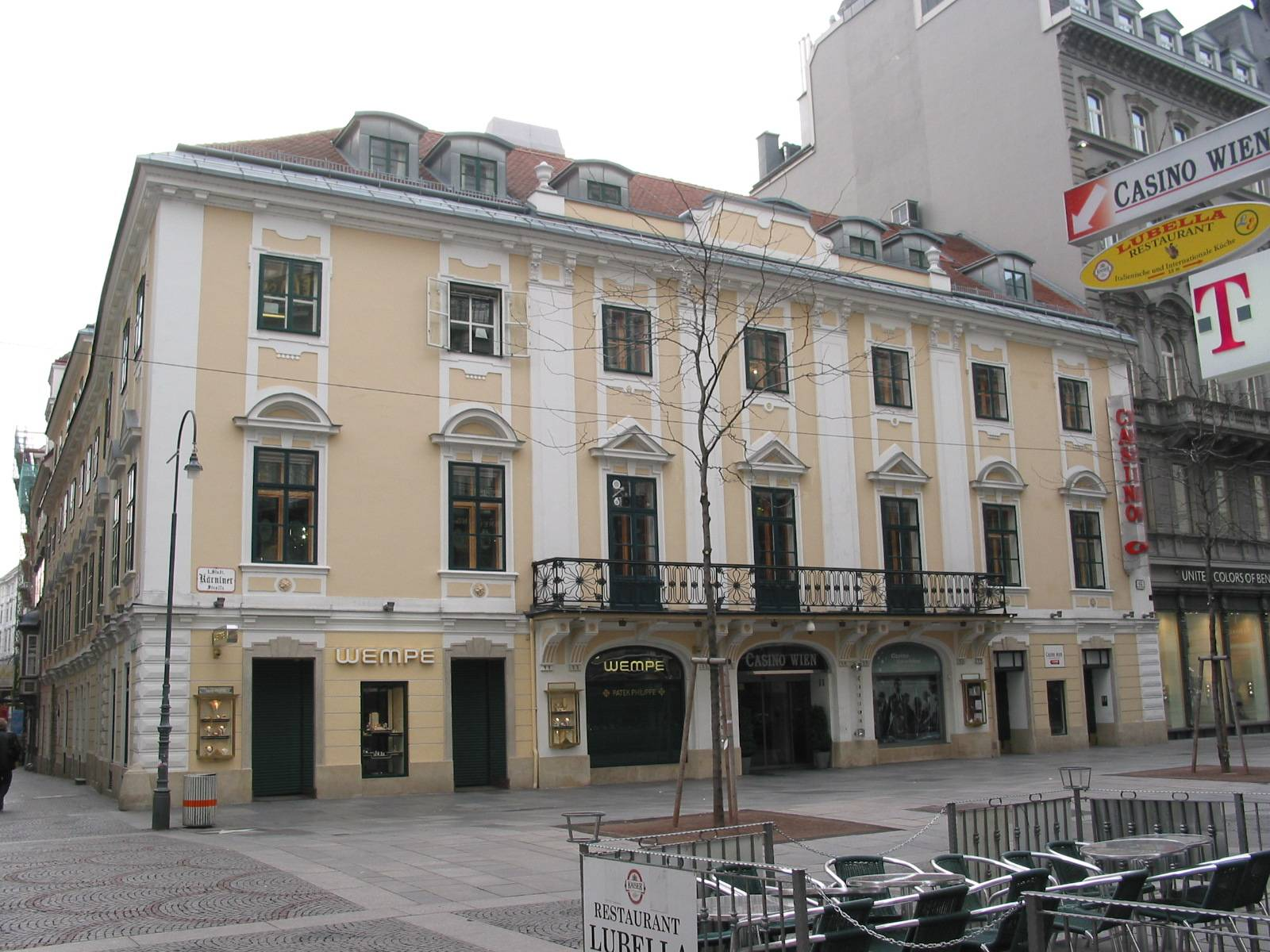 Palais Esterhazy (Casino) in der Kärntner Straße